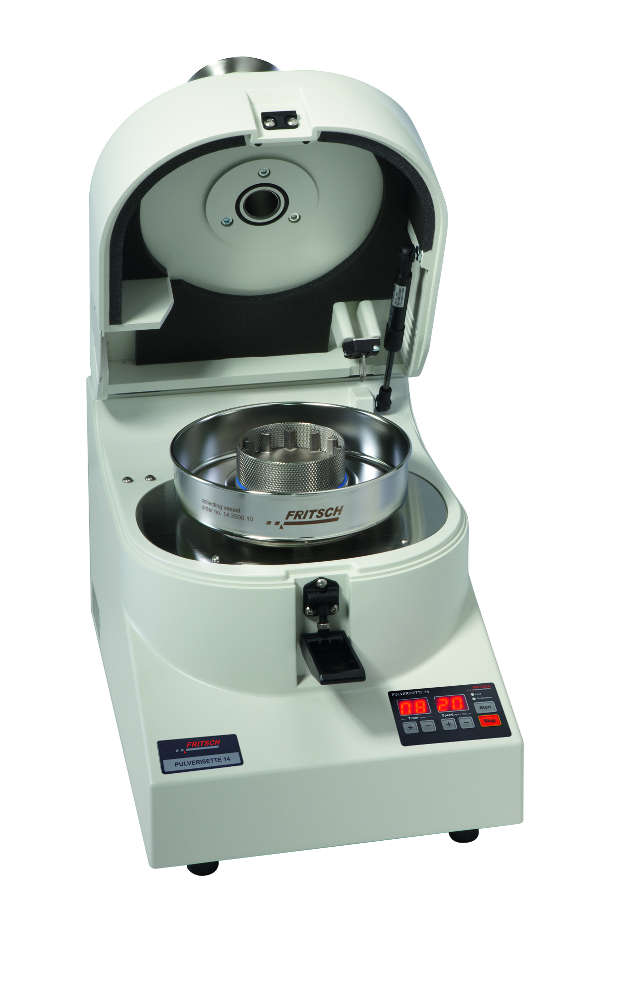 Einblick in den Mahlraum einer Zentrifugalmühle.